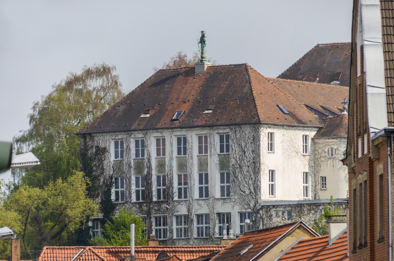 Das Don-Bosco-Jugendheim in St. Arnual, Saarbrücken.